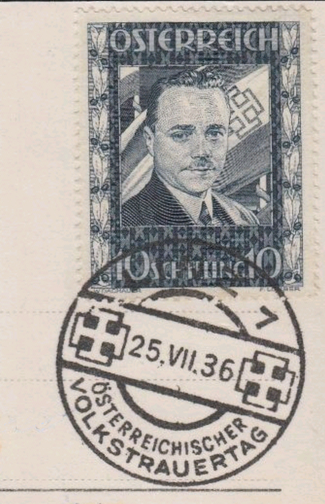 Gedenkmarke, Engelbert Dollfuß (* 4. Oktober 1892 in Texing; † 25. Juli 1934 in Wien) 10 Schilling, Mi588. Sonderstempel "Österreichischer Volkstrauertag 25. Juli 1936".